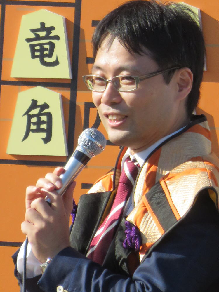 将棋棋士の北浜健介（令和元年年１１月、姫路市で行われた人間将棋にて）